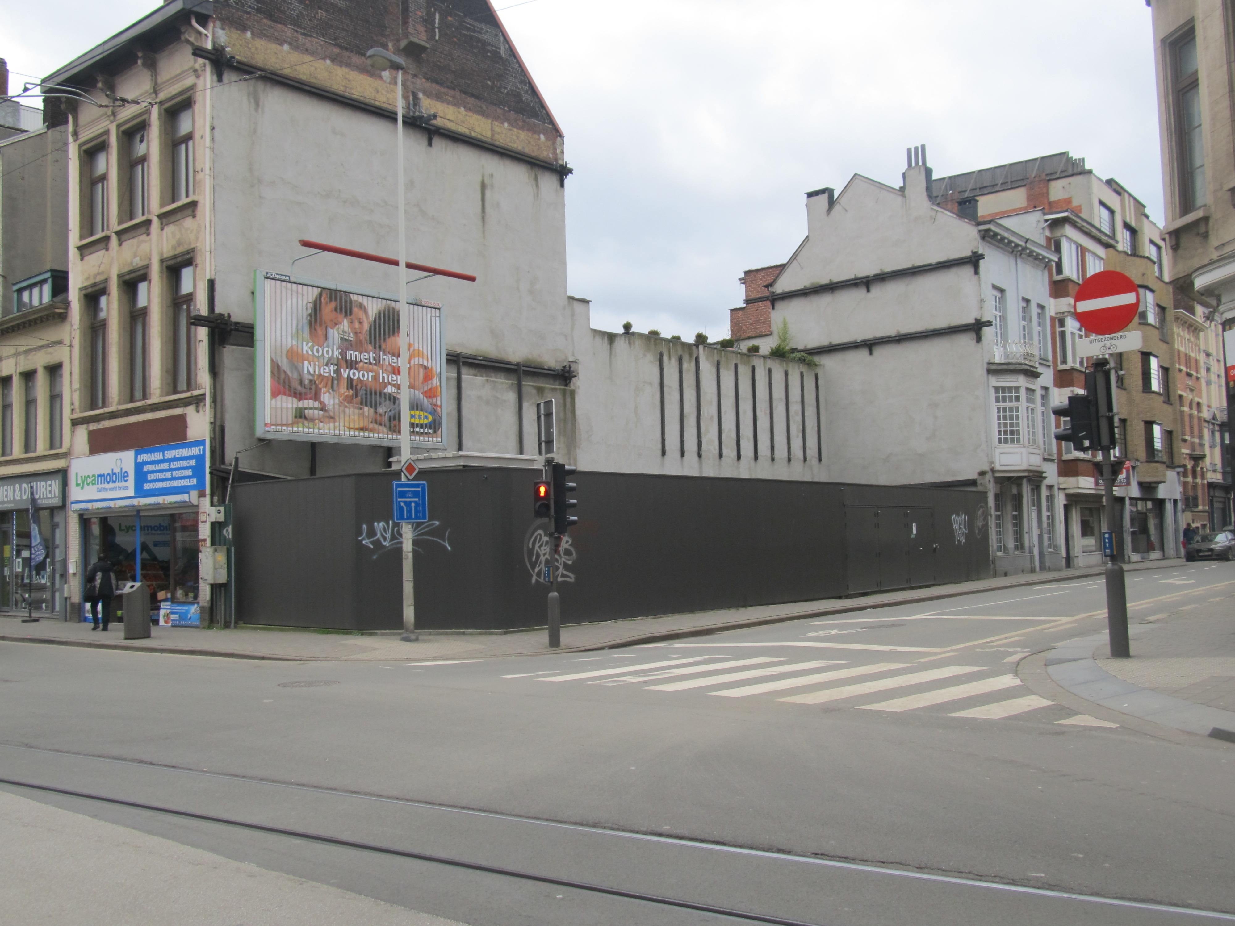 Stația fantomă Carnot din Antwerpen. Intrarea în stație se află în spatele gardului metalic instalat de De Lijn.